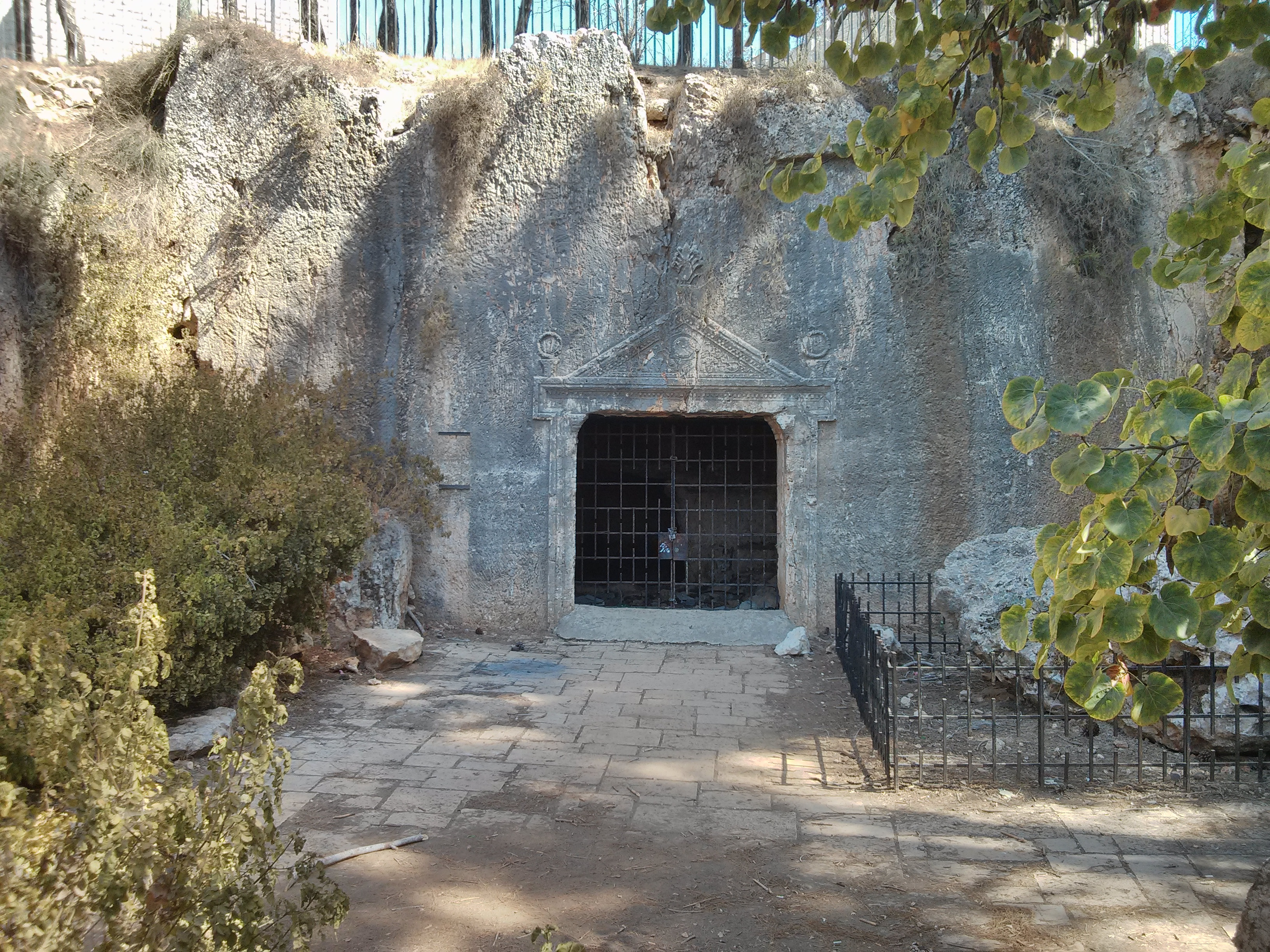 מערכת קבורה מפוארת